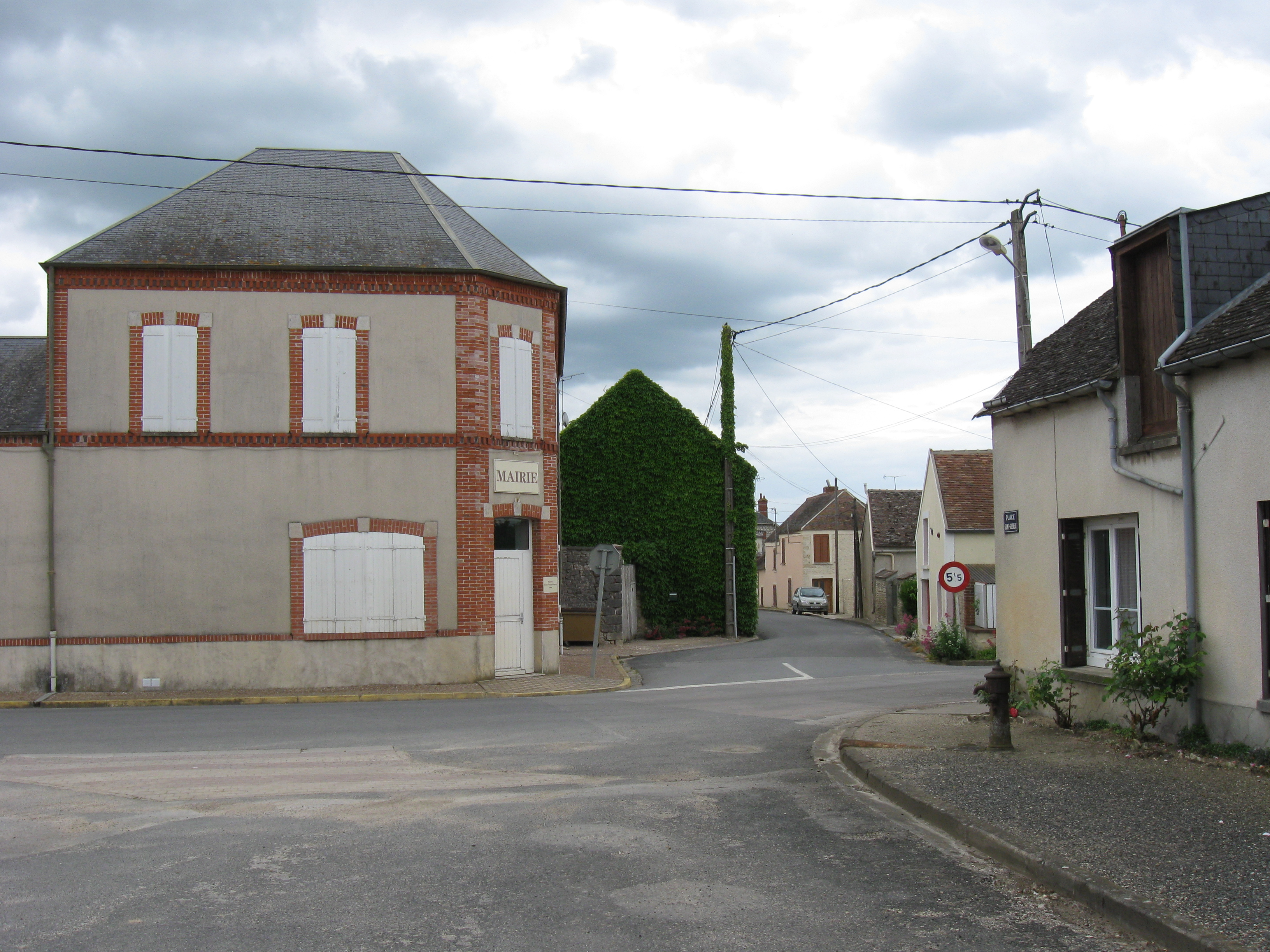 La mairie de Mondreville. (département de la Seine-et-Marne, région Île-de-France).